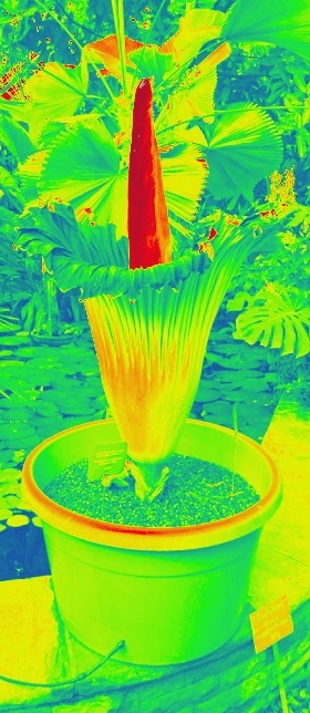 Titanenwurz-Wärmebild mit einer Temperatur von etwas über 30 Grad Celsius